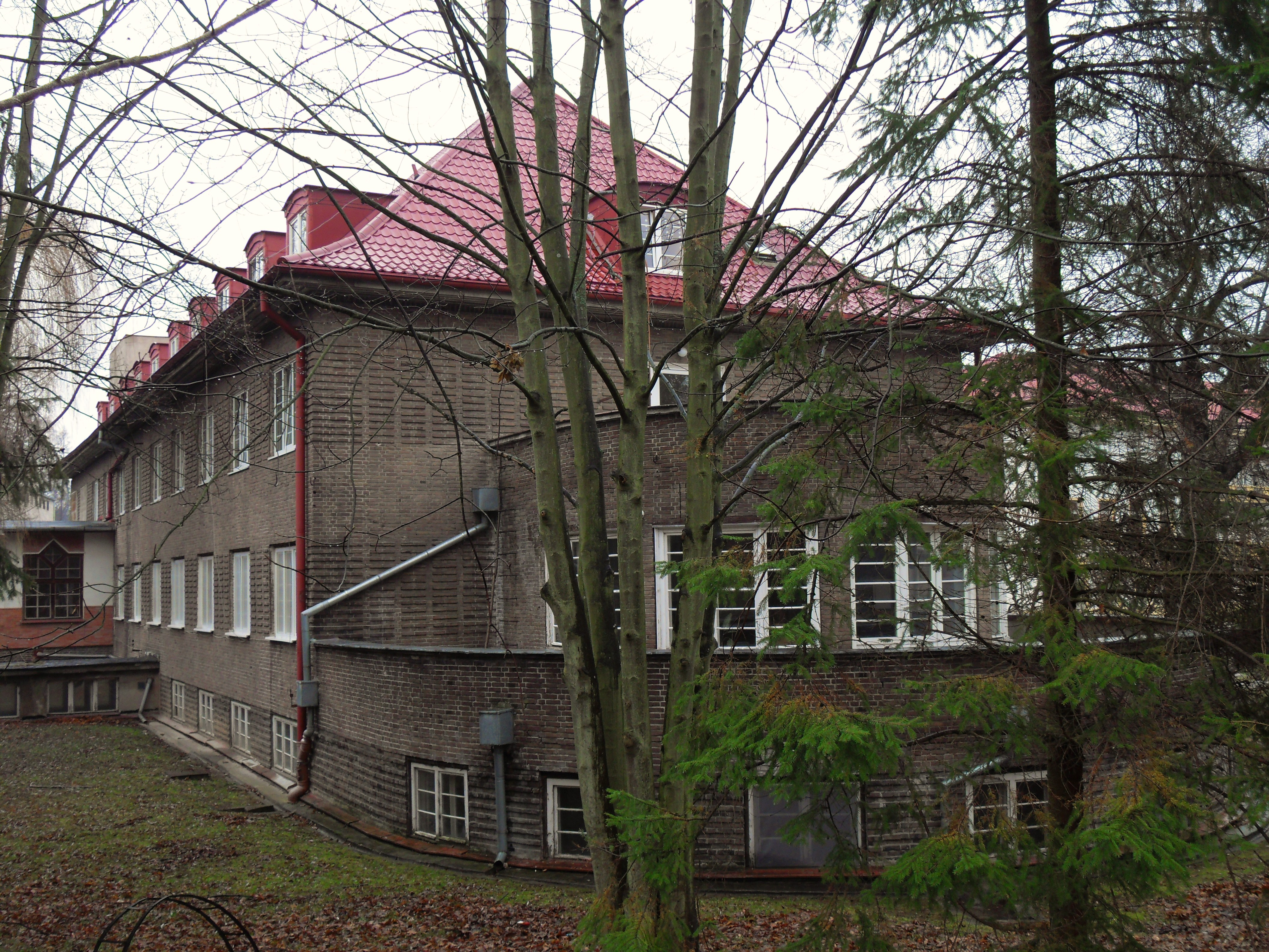 Gdańsk. Jeden z budynków 7. Szpitala Marynarki Wojennej (architekt Fritz Höger